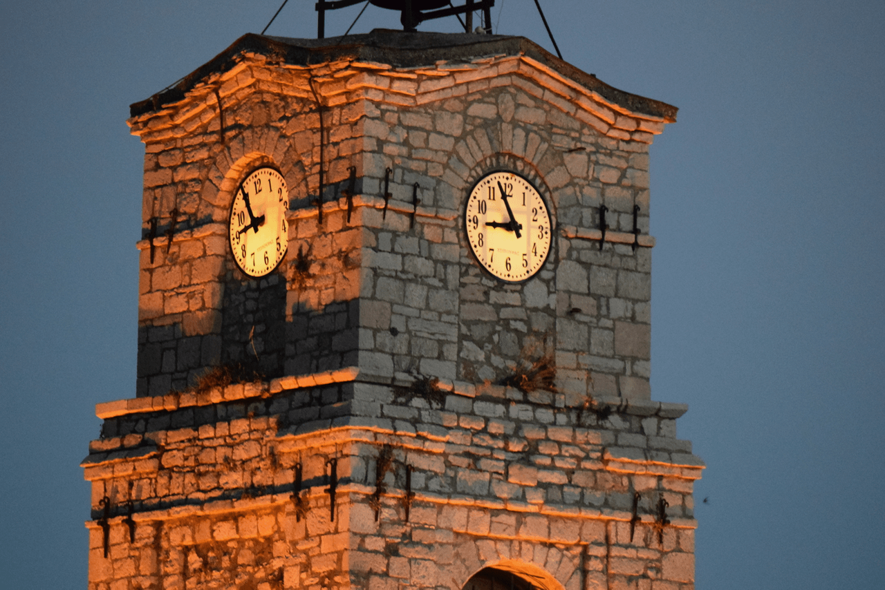 Ρολόι Αράχωβας - φωτ. 08/2017 G. Katsiampas